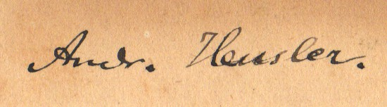 Autograph des Altgermanisten Andreas Heusler (1865–1940)